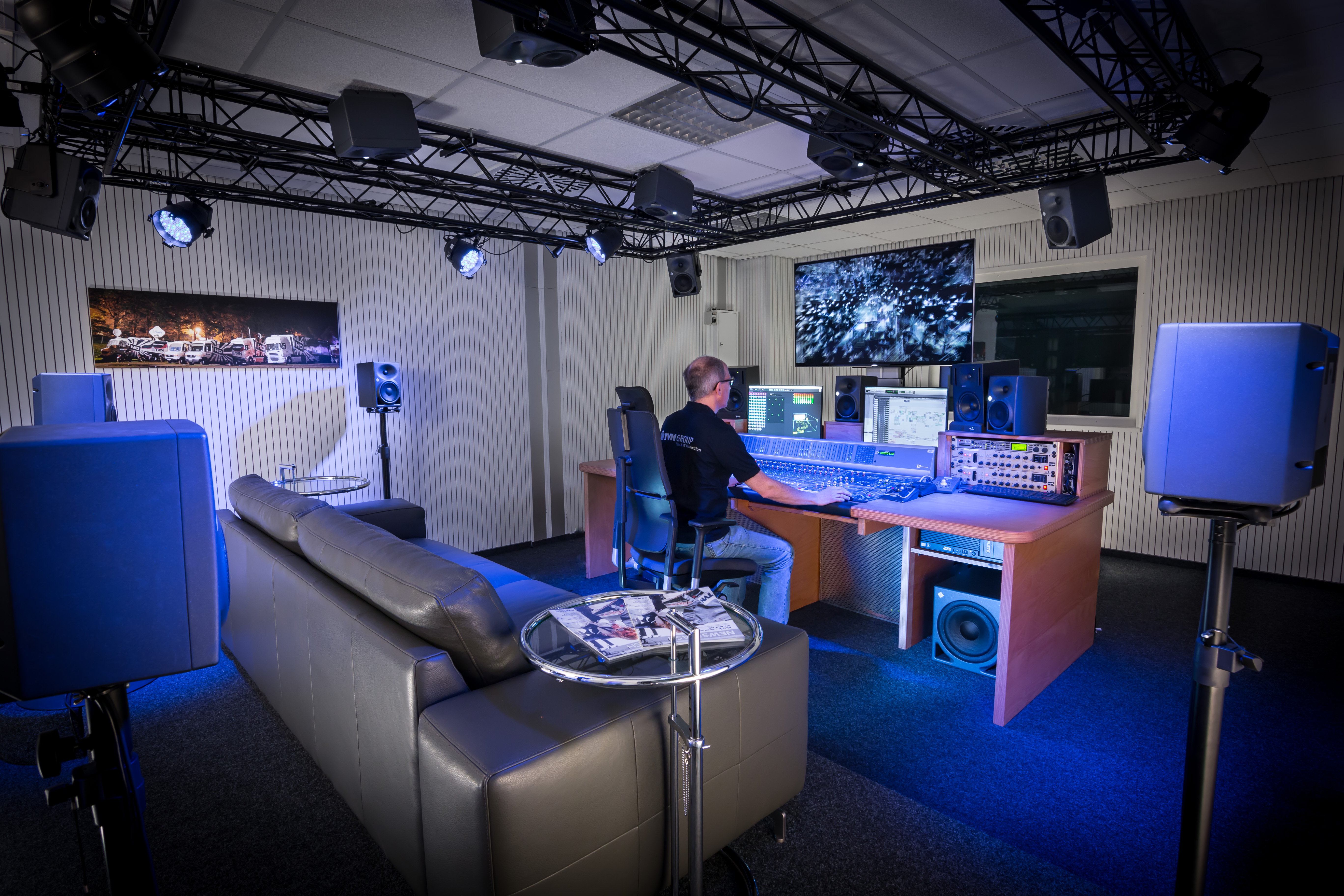 Das Dolby Atmos Studio der TVN Group imin Hannover.